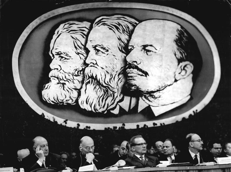 Zentralbild Kollektiv Me-At. 15.1.63 VI.Parteitag der SED vom 15.-21.1.1963 in der Werner-Seelenbinder-Halle in Berlin (1.Tag). UBz.: Blick auf das Präsidium (V.l.n.r.): das Mitglied des Politbüros des ZK der SED, Albert Norden, der Stellvertretende Generalsekretär der Kommunistischen Partei Frankreichs Waldeck-Rochet, das Mitglied des Politbüros des ZK der SED Erich Honecker und der Sekretär des ZK der KPdSU Boris Ponomarjow. (Heilig)